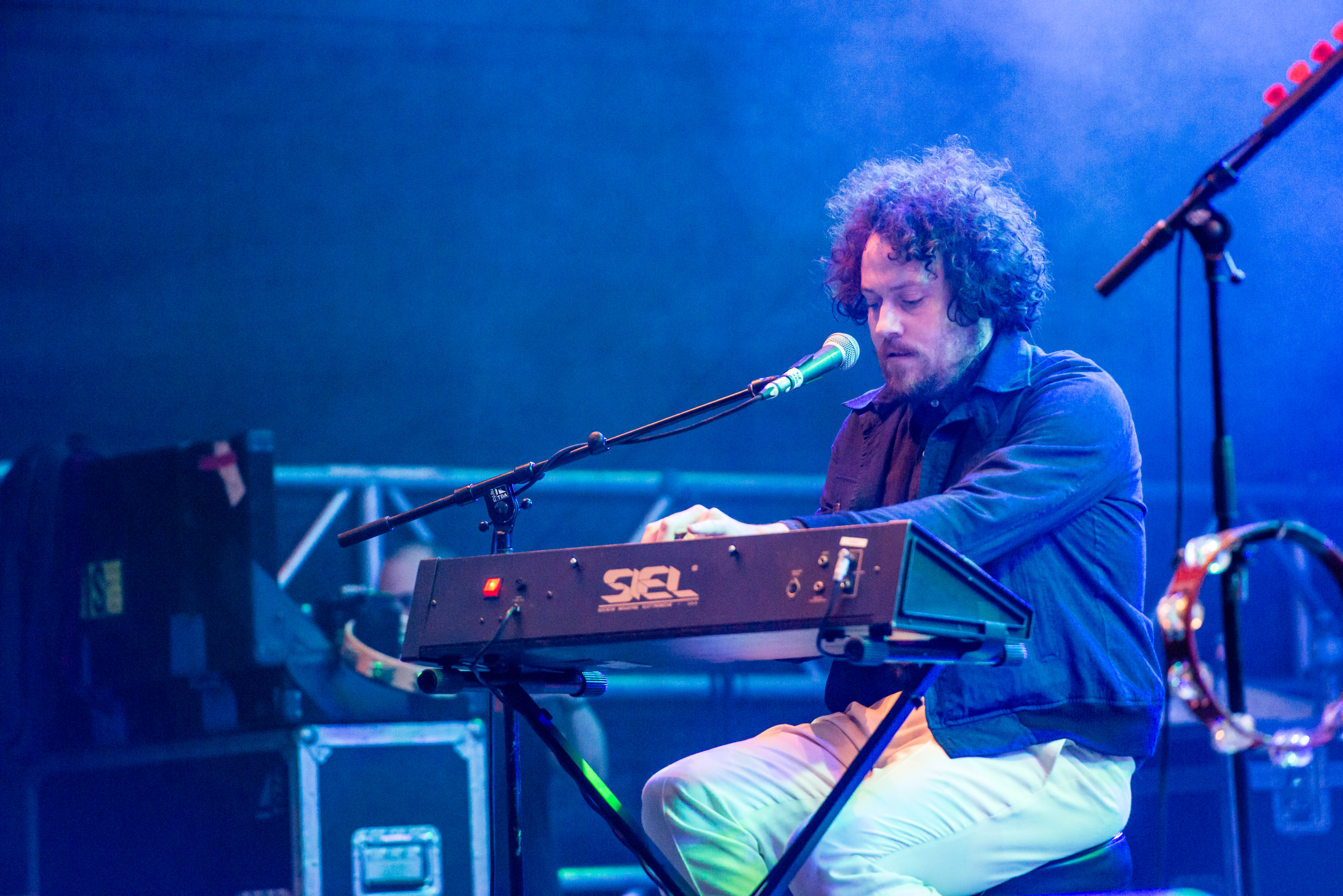 'Open Source Festival 2015; Düsseldorf Galopprennbahn': 'Metronomy'